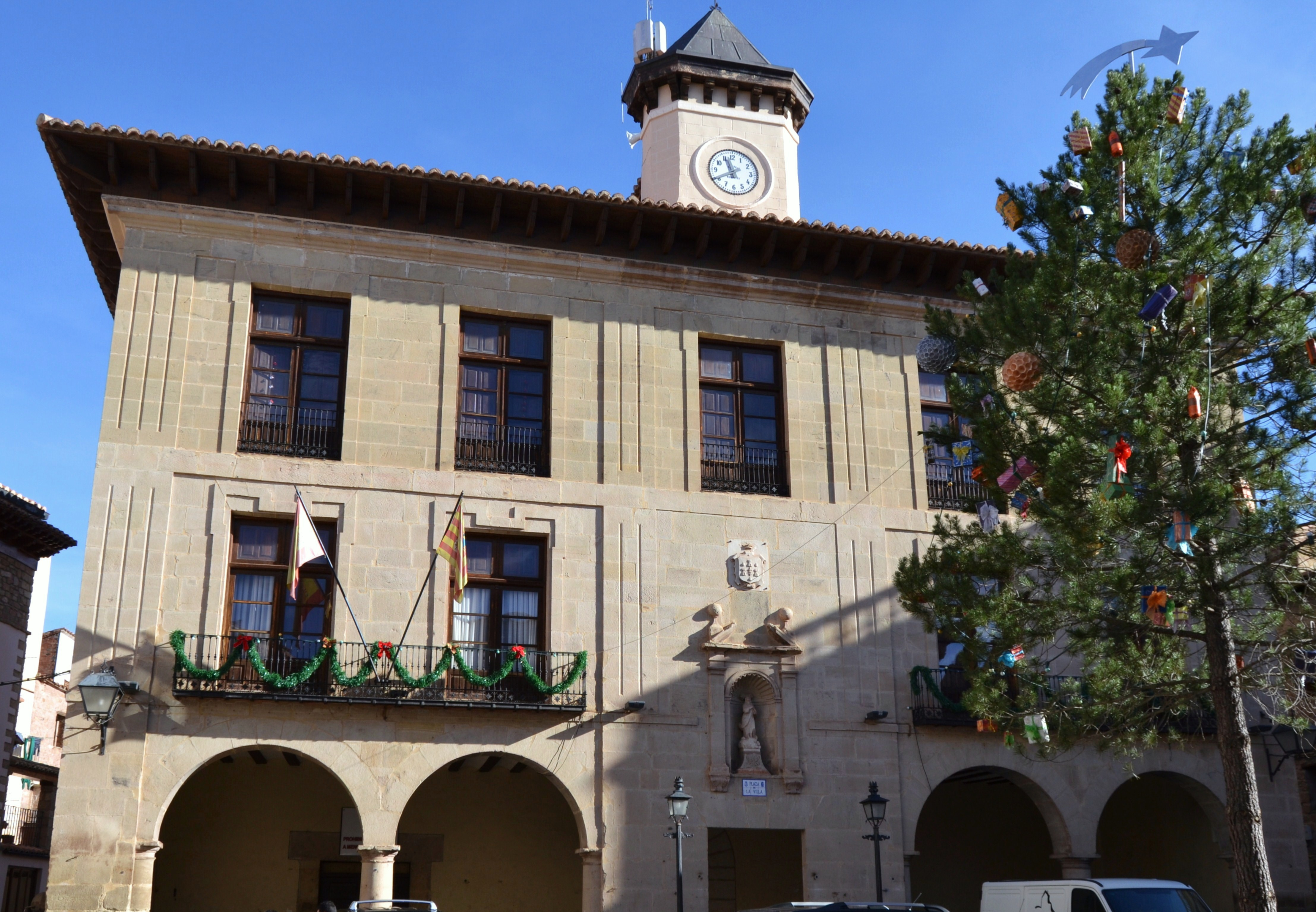 Ajuntament, Móra de Rubiols.